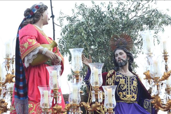 Paso de la Samaritana (Róque López 1799). Cofradía de los Coloraos (Murcia)